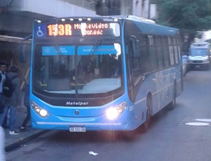 Volkswagen de la línea 153, operada por la empresa Movi